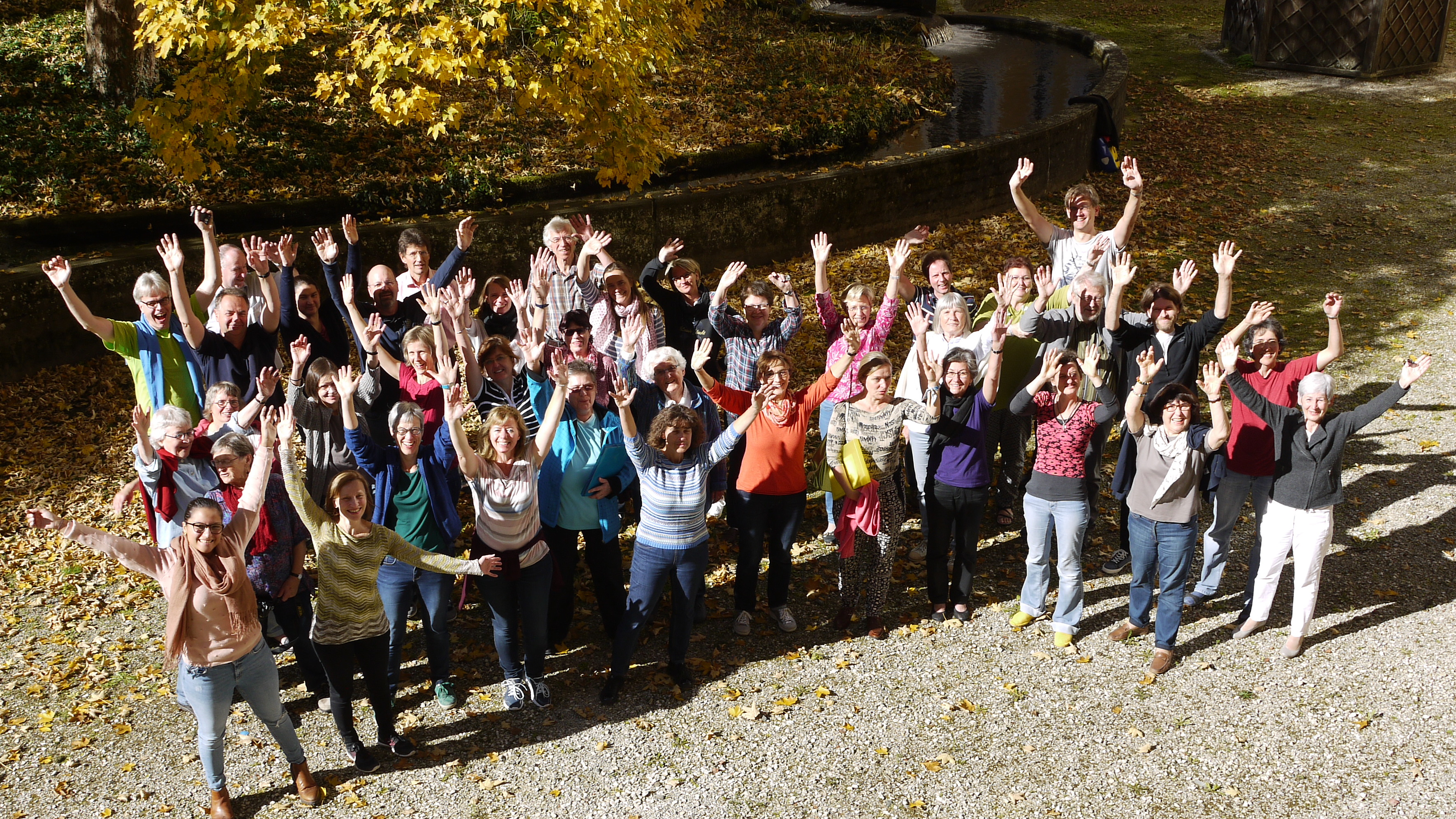 Foto von Wolfram Steinmayer Chor- und Orchesterwochenende in der Landesakademie Ochsenhausen